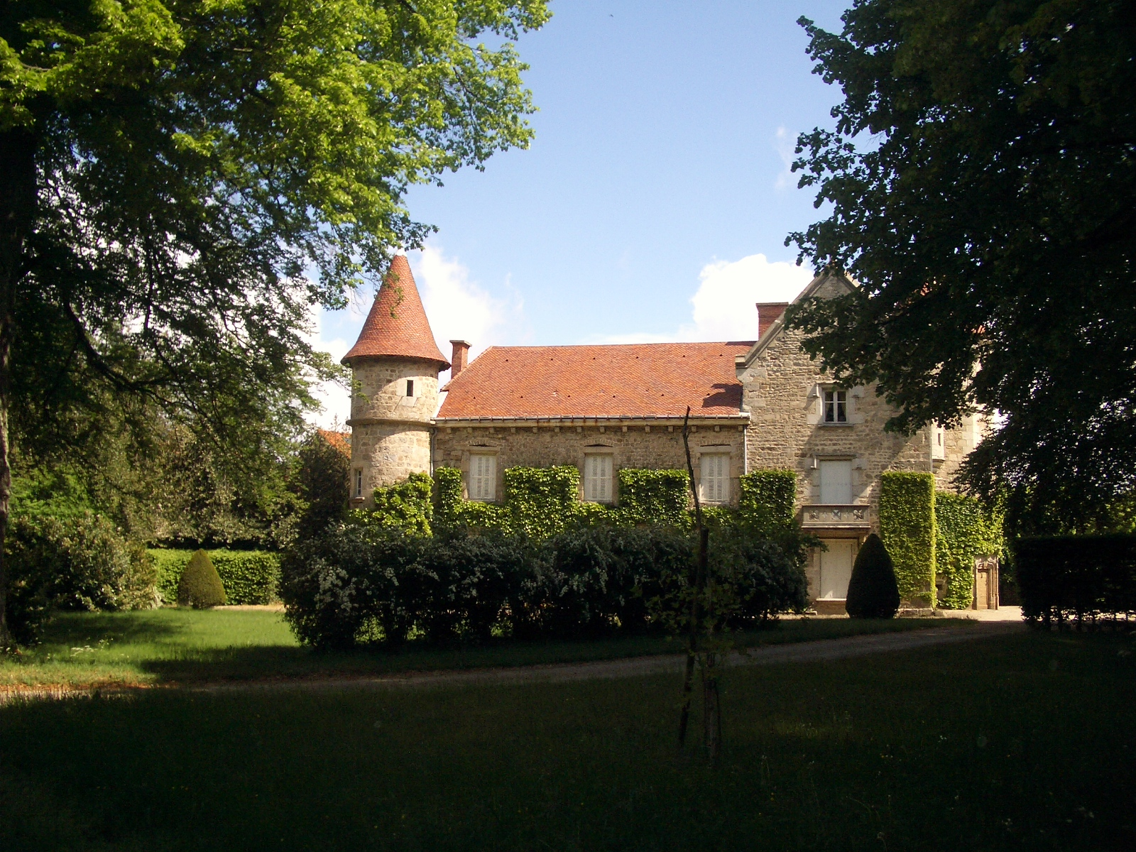 château du village de St-Romain-Lachalm. Classé aux Monuments historiques.